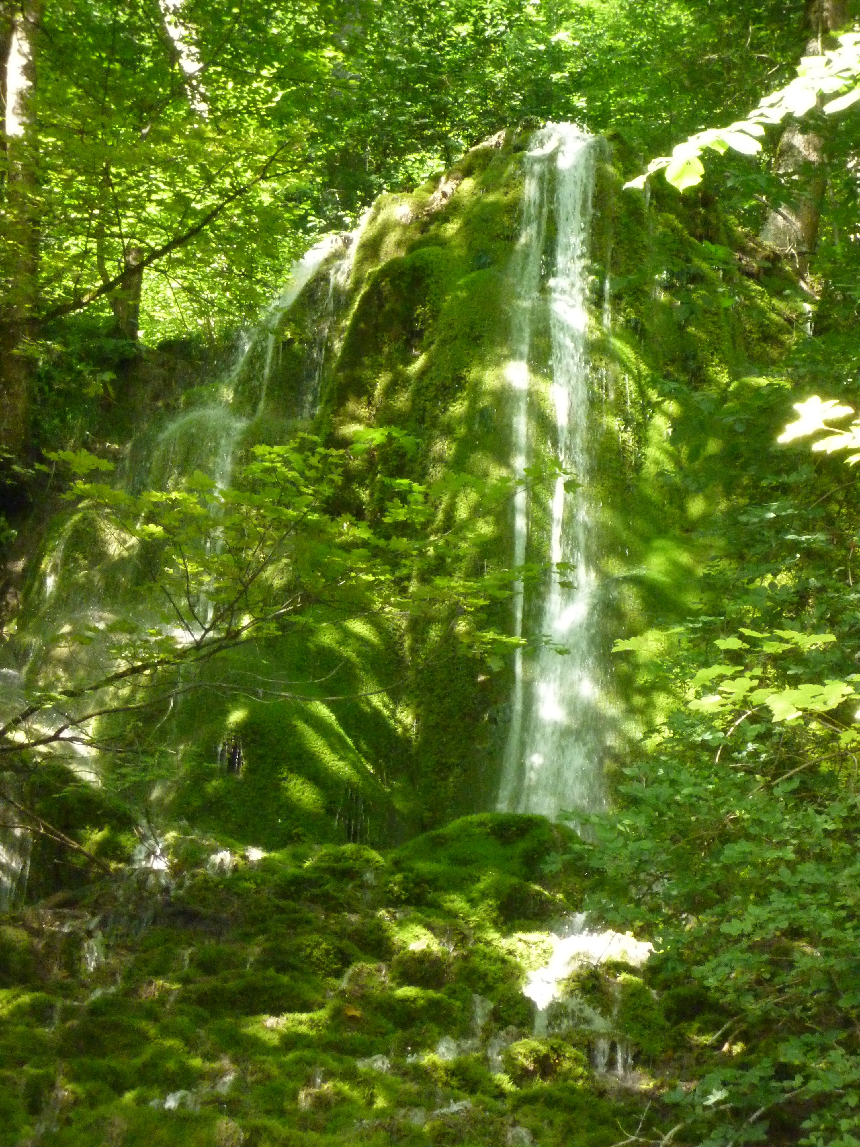 Bad Urach - Gütersteiner Wasserfälle 625 Hm ü.N.N.